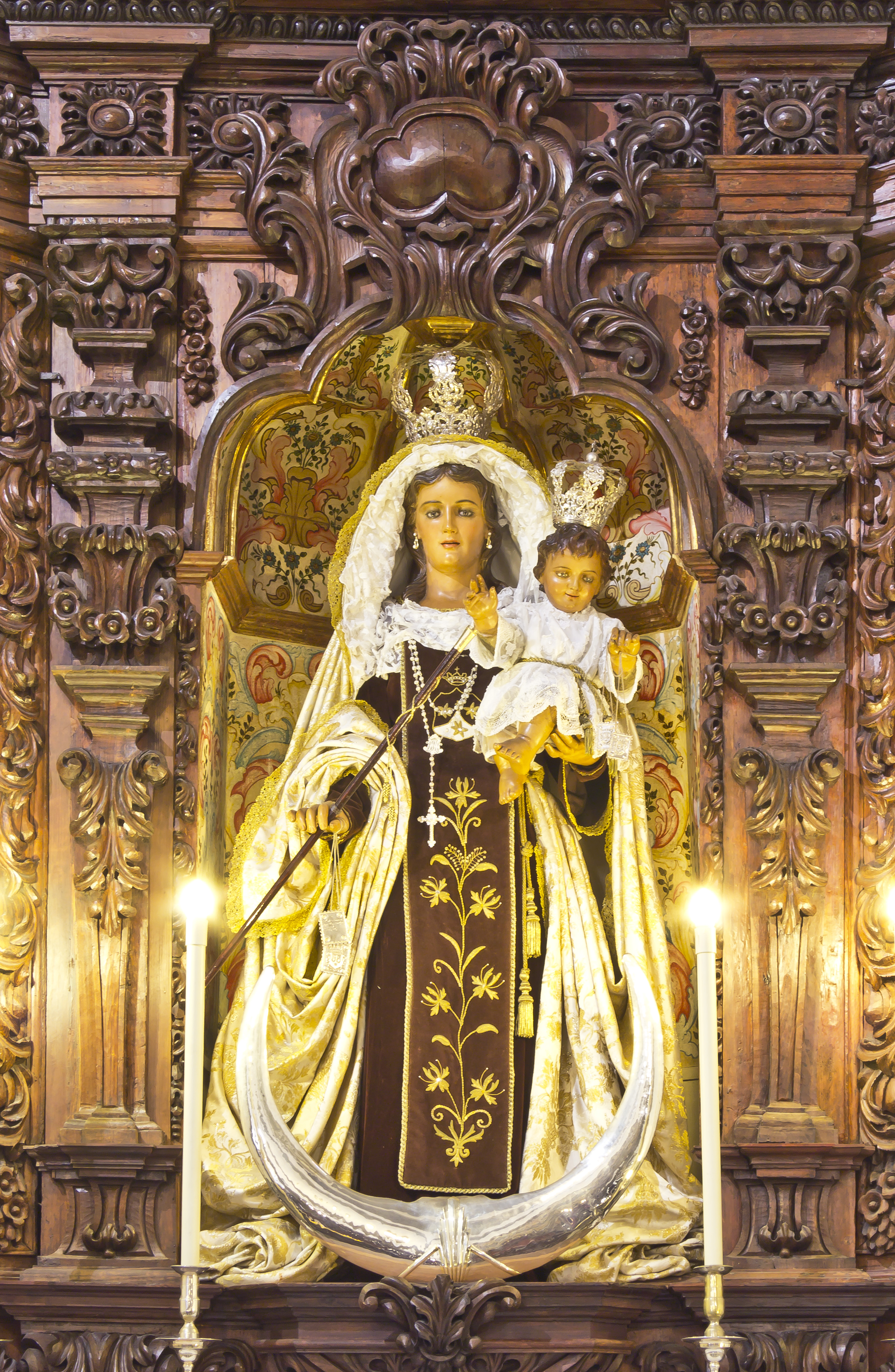 Parroquia de Nuestra Señora de la Peña de Francia, Virgen del Carmen, Madera tallada y policromada. Ángel Acosta. Tarragona, 1954